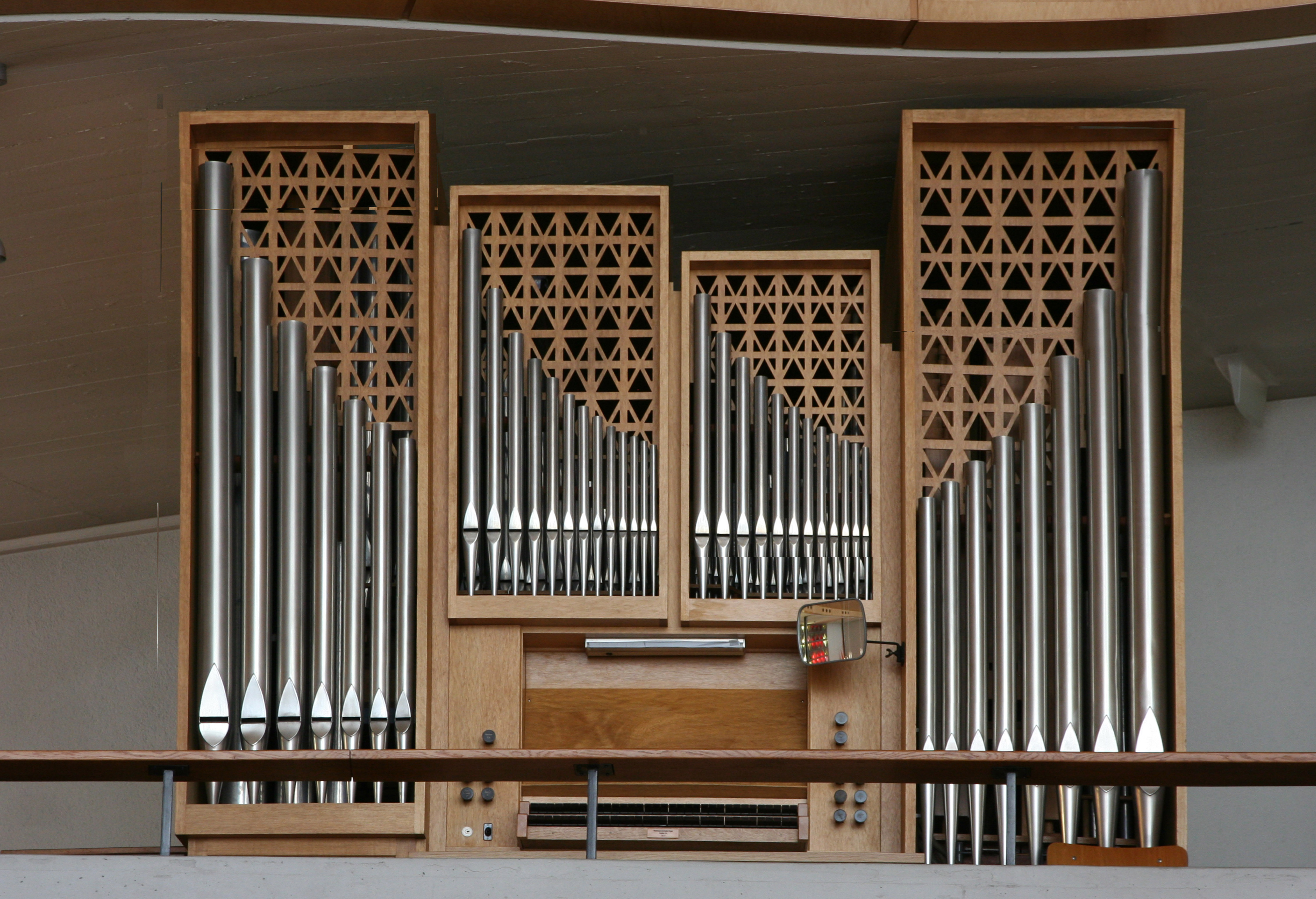 Römisch-katholische Pfarrkirche Bruder Klaus Biel